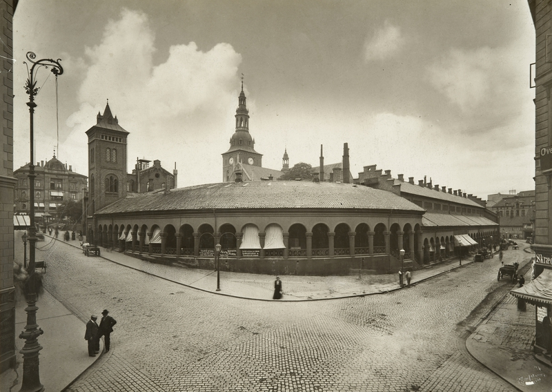 Gatekryss, Brannvakten, basarer, Vår Frelsers kirke, forretningsgårder, mennesker, gateliv, gatelegeme, brosten.